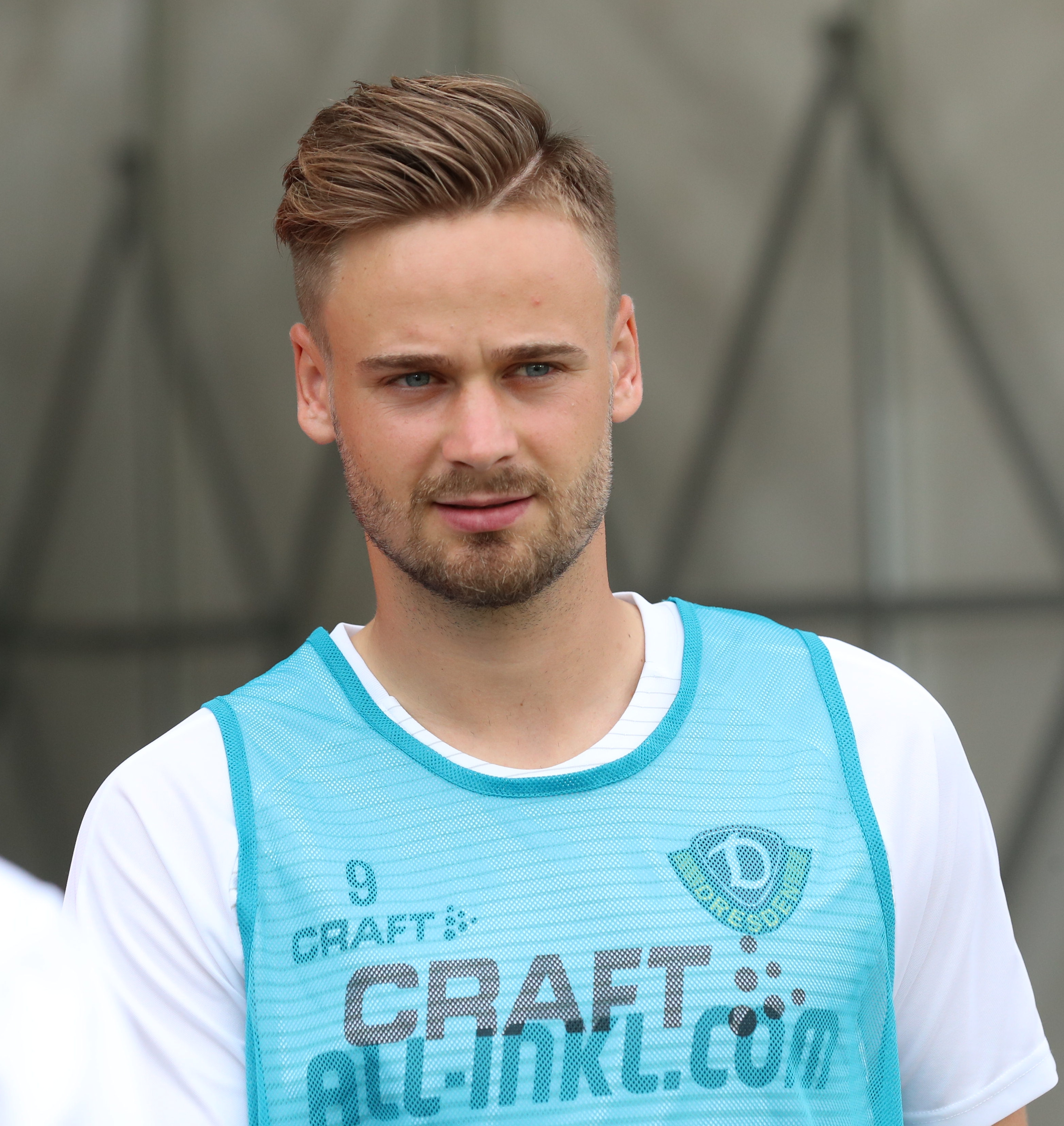 DFB-Pokal 2019/20, 1. Hauptrunde, TuS Dassendorf gegen SG Dynamo Dresden 0:3 (0:1)